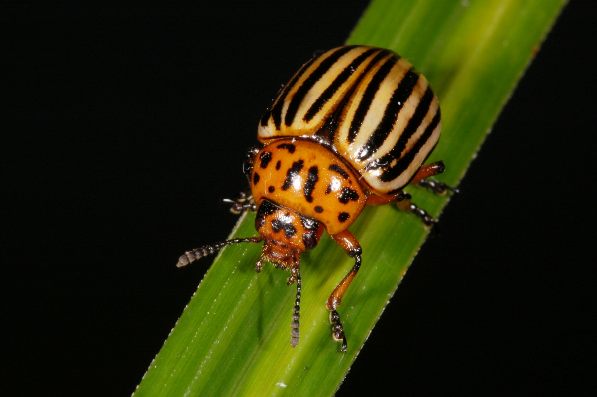 Leptinotarsa decemlineata, Männchen, Selzerbrunnen, Frankfurt am Main, Hessen, Deutschland